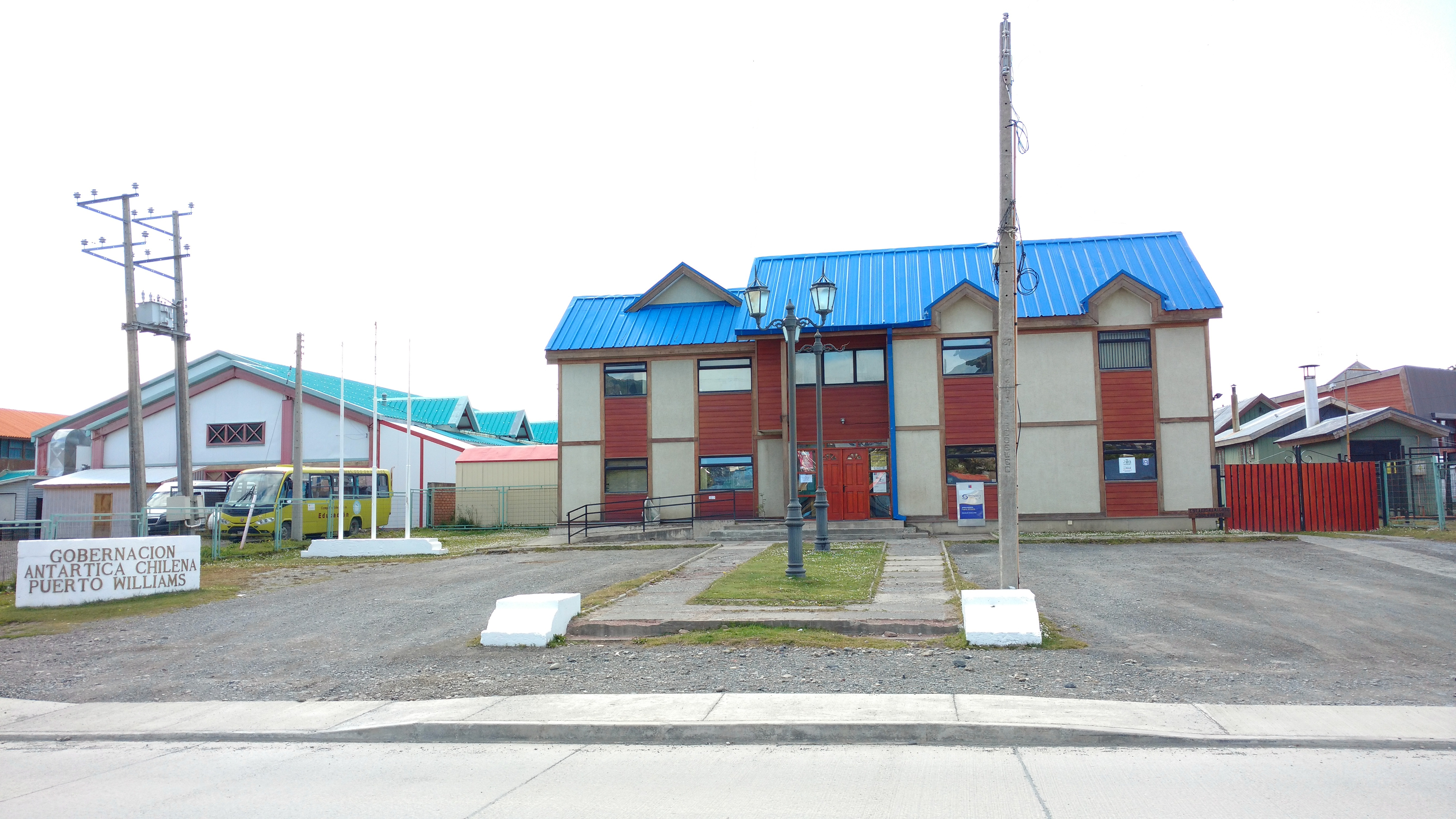 Fachada de la Gobernación Provincia Antártica Chilena, Chile